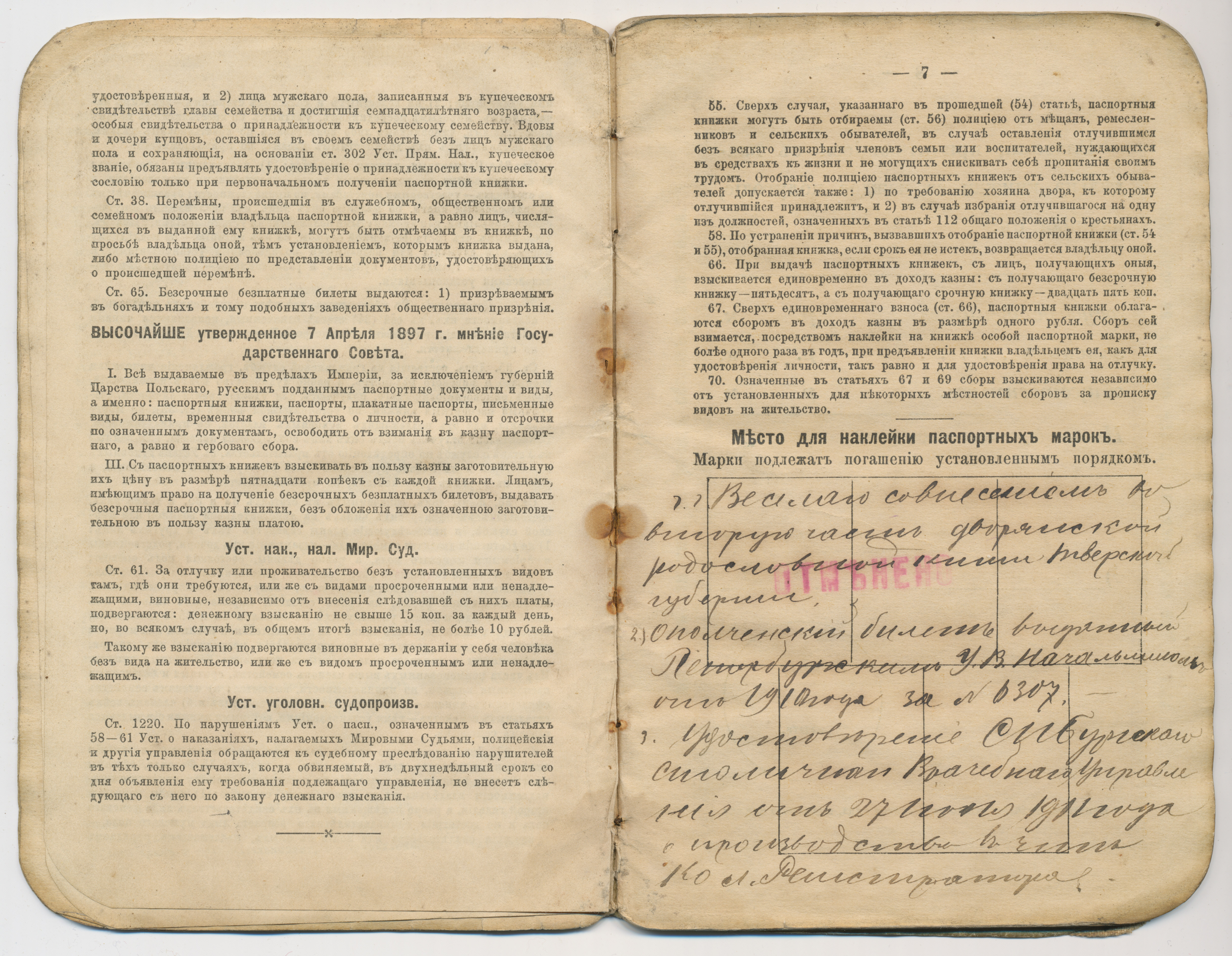 Паспорт Веселаго Василия Сергеевича, с. 7 Рукописный текст на с. 7 является продолжением текста со с. 3: «Свидѣтельство Тверскаго Дворянскаго Депутатскаго Собранiя отъ 31 мая 1894 года за № 221, о пречисленiи къ дворянскому роду см. стр. 7...» «...г.г. Веселаго совнесенiемъ во вторую часть дворянской родословной книги Тверской губернiи. 2) Ополченскiй билетъ, выданный Петербургскимъ У.В. Начальникомъ отъ 1910 года за № 6307. 3) Удостоверенiе СПбургскаго Столичнаго Врачебнаго Управленiя отъ 27 Iюня 1911 года о производстве въ чинъ Кол. Регистратора.» Коллежский асессор ошибся. На самом деле ополченский билет № 6307 выдан в 1901 году не Петербургским, а Петергофским уездным воинским начальником, подполковником Янушевским (?) Александром Ивановичем